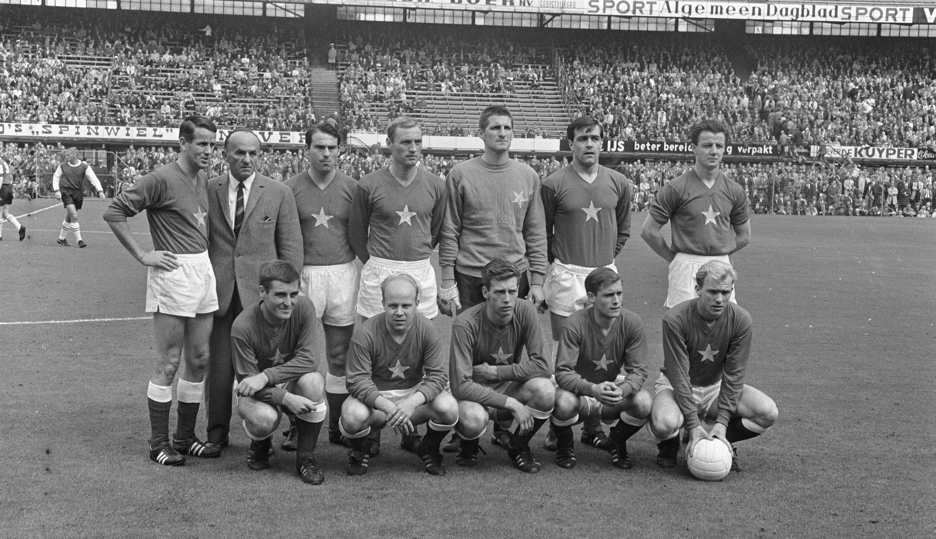 Collectie / Archief : Fotocollectie Anefo Reportage / Serie : Voetbalwedstrijd van Feyenoord tegen MVV te Rotterdam Beschrijving : Teamfoto van MVV: staand; Krisp, trainer Donnenfeld, Toenaer, Nemes, Korver, Thal, Quadackers, zittend; Bergstein, Hoenen, Bonfrere, Staats en Brokamp Datum : 4 september 1966 Locatie : Rotterdam, Zuid-Holland Trefwoorden : sport, voetbal Fotograaf : Fotograaf Onbekend / Anefo Auteursrechthebbende : Nationaal Archief Materiaalsoort : Negatief (zwart/wit) Nummer archiefinventaris : bekijk toegang 2.24.01.05 Bestanddeelnummer : 919-5260